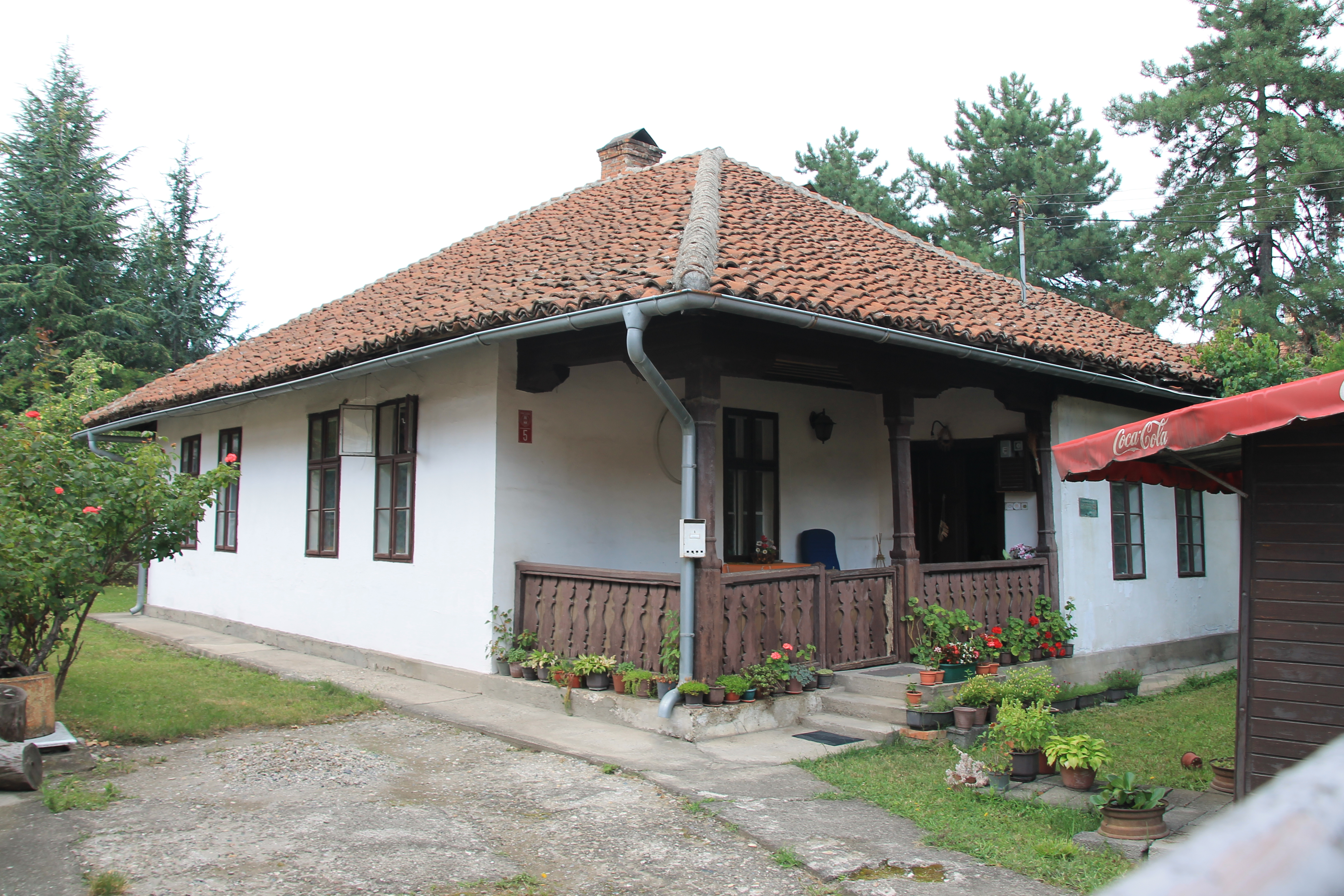 Kuće u Svetozara Markovića (Kragujevac)